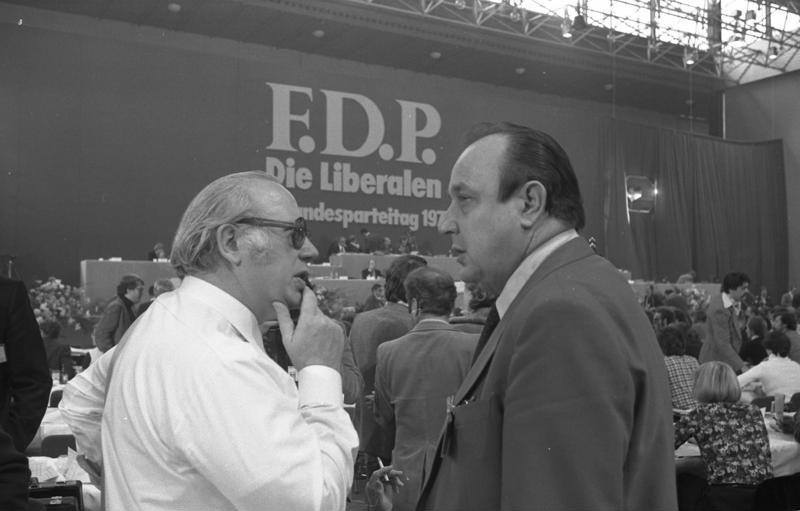 28. Ordentlicher Bundesparteitag der FDP in der Kieler Ostseehalle (links: Wolfram Dorn, rechts: Hans-Dietrich Genscher) 6.-8.11.1977